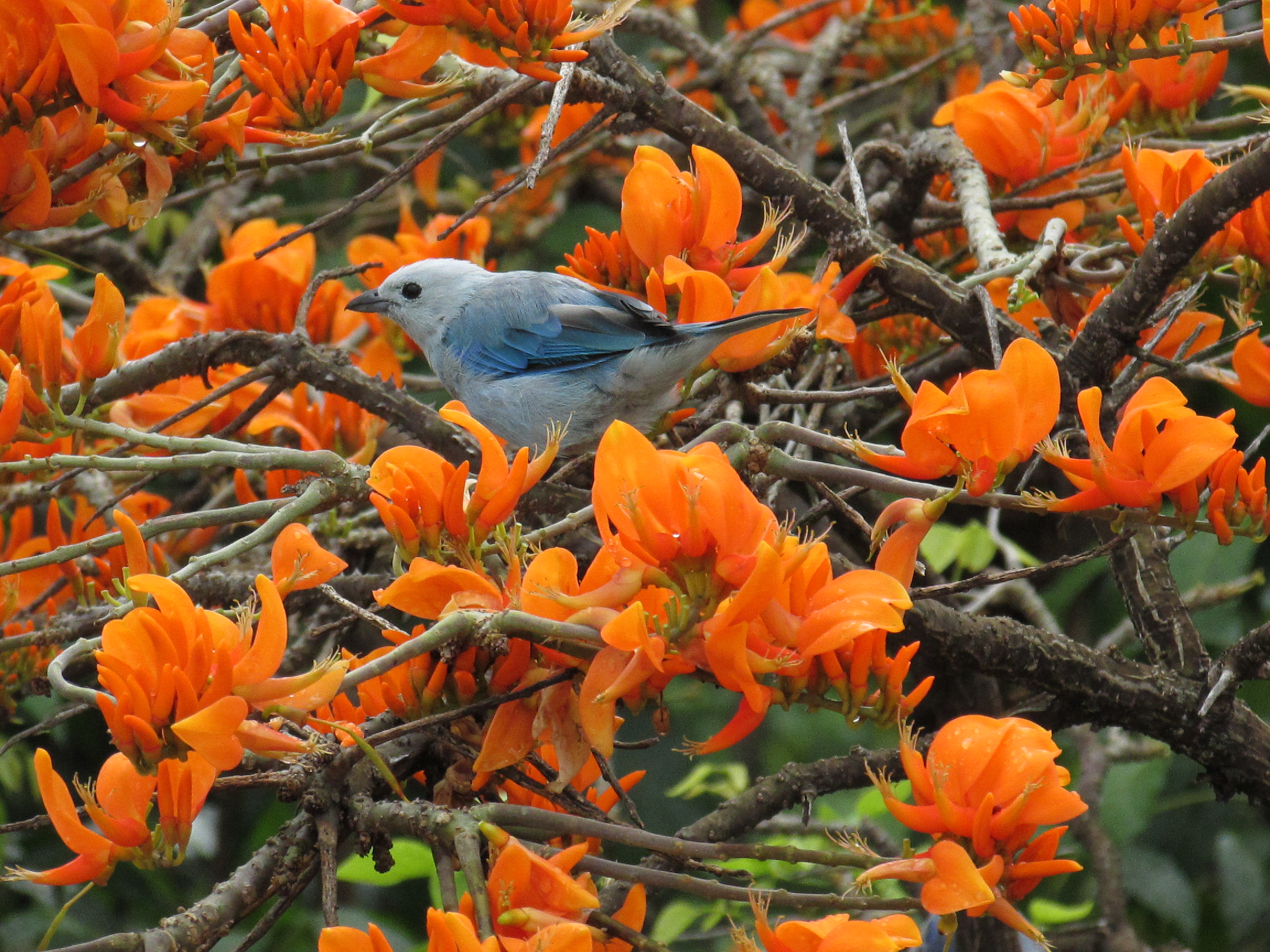 Un azulejo de jardín (Thraupis episcopus) posado entre las ramas de un Bucare Ceibo (Erythrina poeppigiana) que ha estallado en flor. En gran parte del territorio nacional, durante ciertos periodos del año, es común observar a estos árboles florecer ofreciendo néctar y sus brotes tiernos a diversos animales, entre ellos aves, pequeños mamíferos e insectos.